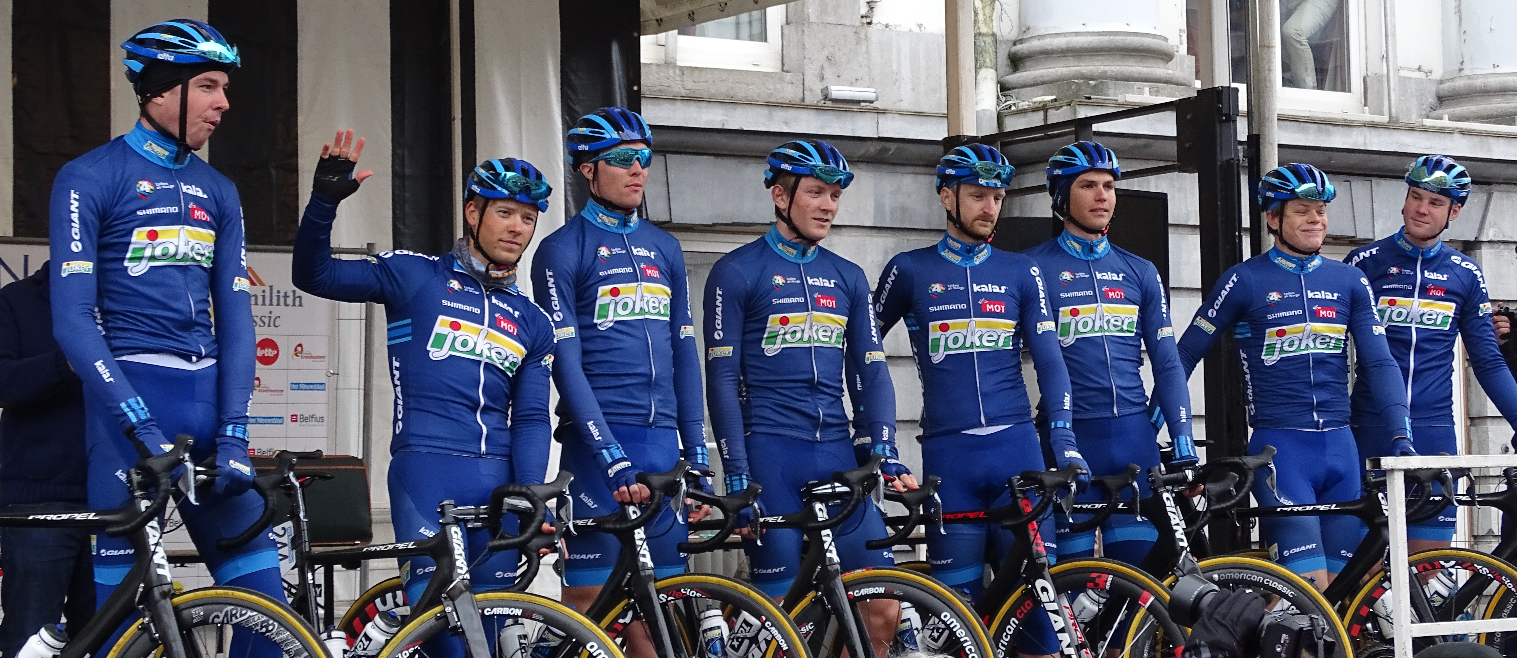 Reportage réalisé le mercredi 18 mars à l'occasion du départ de la Nokere Koerse 2015 à Deinze, Belgique.